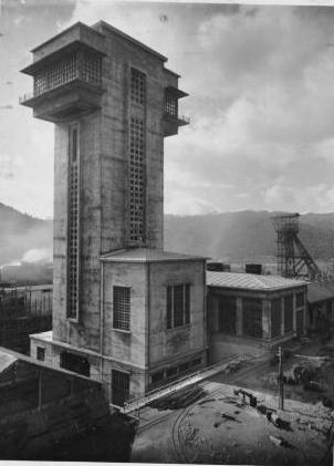 Le chevalement de la mine au puits Destival à Saint-Martin-de-Valgalgues près d'Alès (Gard). Démoli à la fin des années 1990.